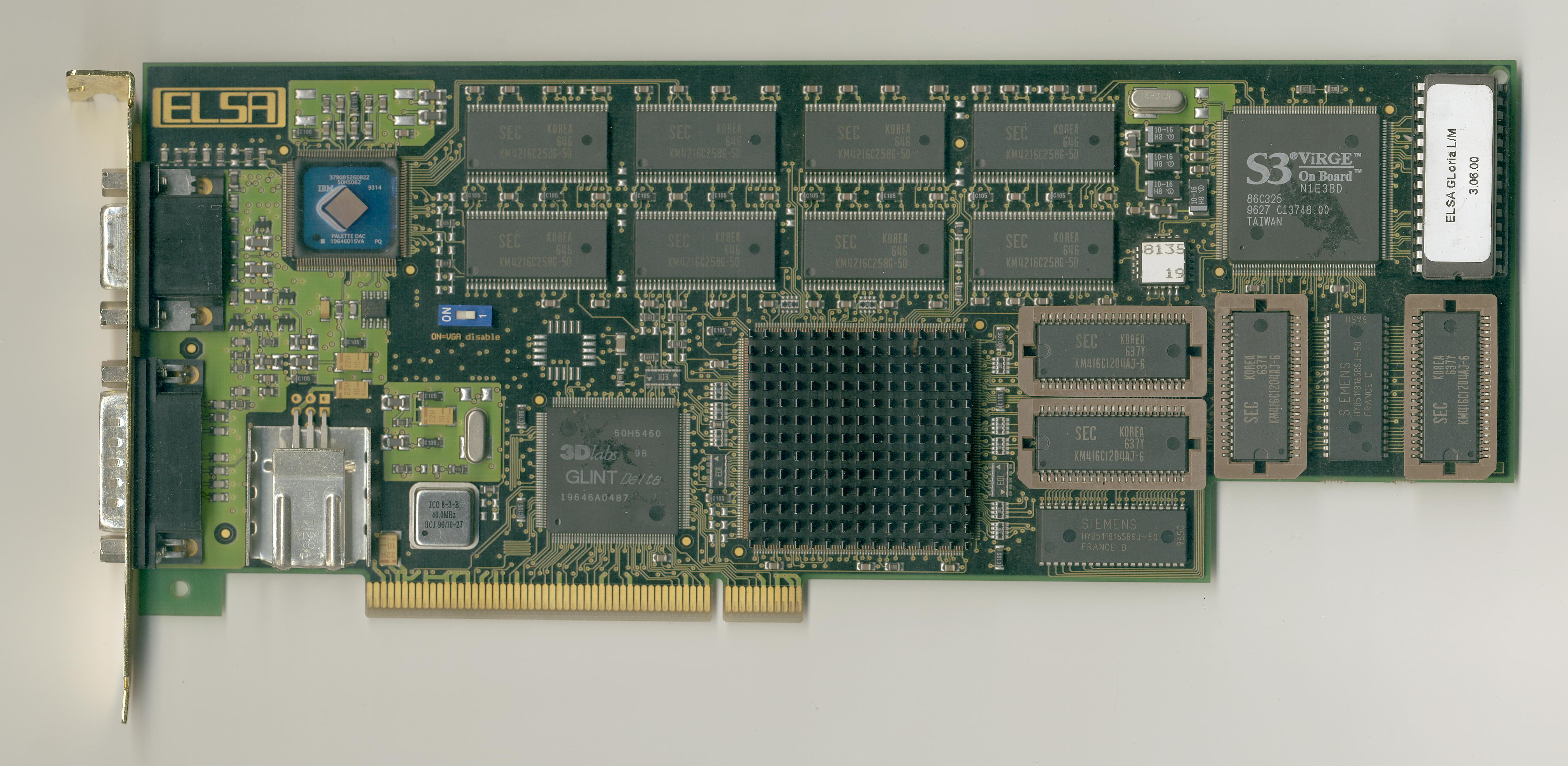 ELSA Gloria L-88 PCI (3Dlabs GLINT MX/Delta)